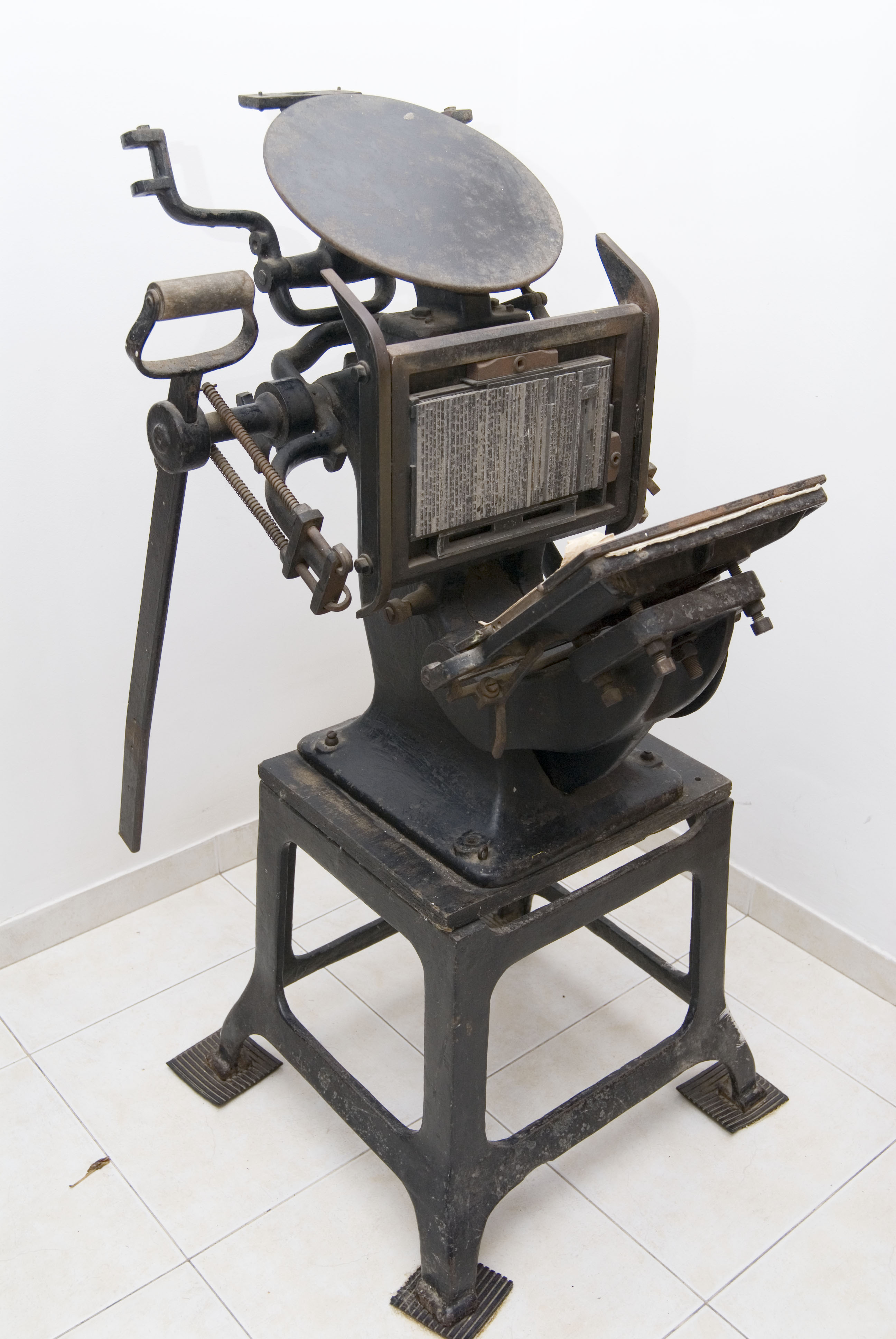 מכונת דפוס ידנית שהביא איתו אהרון איתין